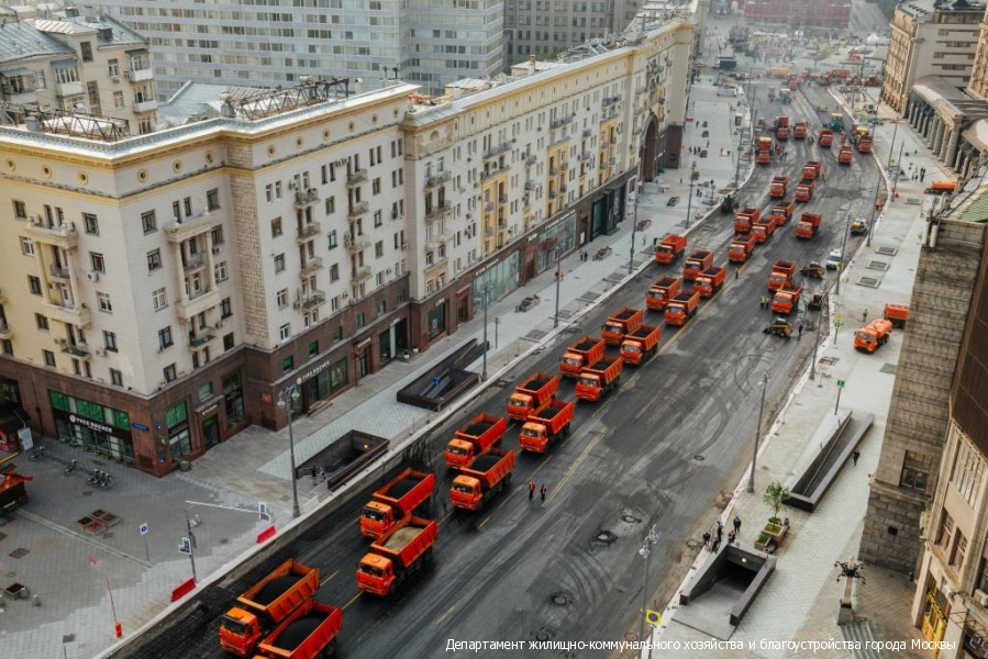 Укладка асфальта на Тверской улице в Москве в рамках масштабной реконструкции и благоустройства улицы в 2016 году.